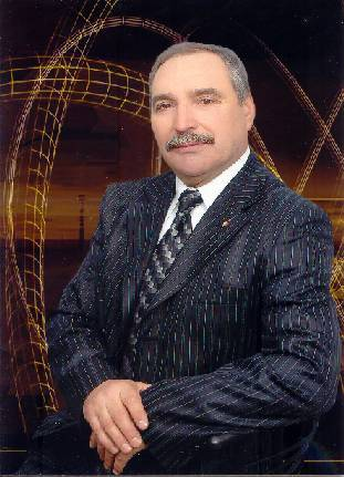 Бурлака Віктор Анатолійович — академік АН вищої школи України